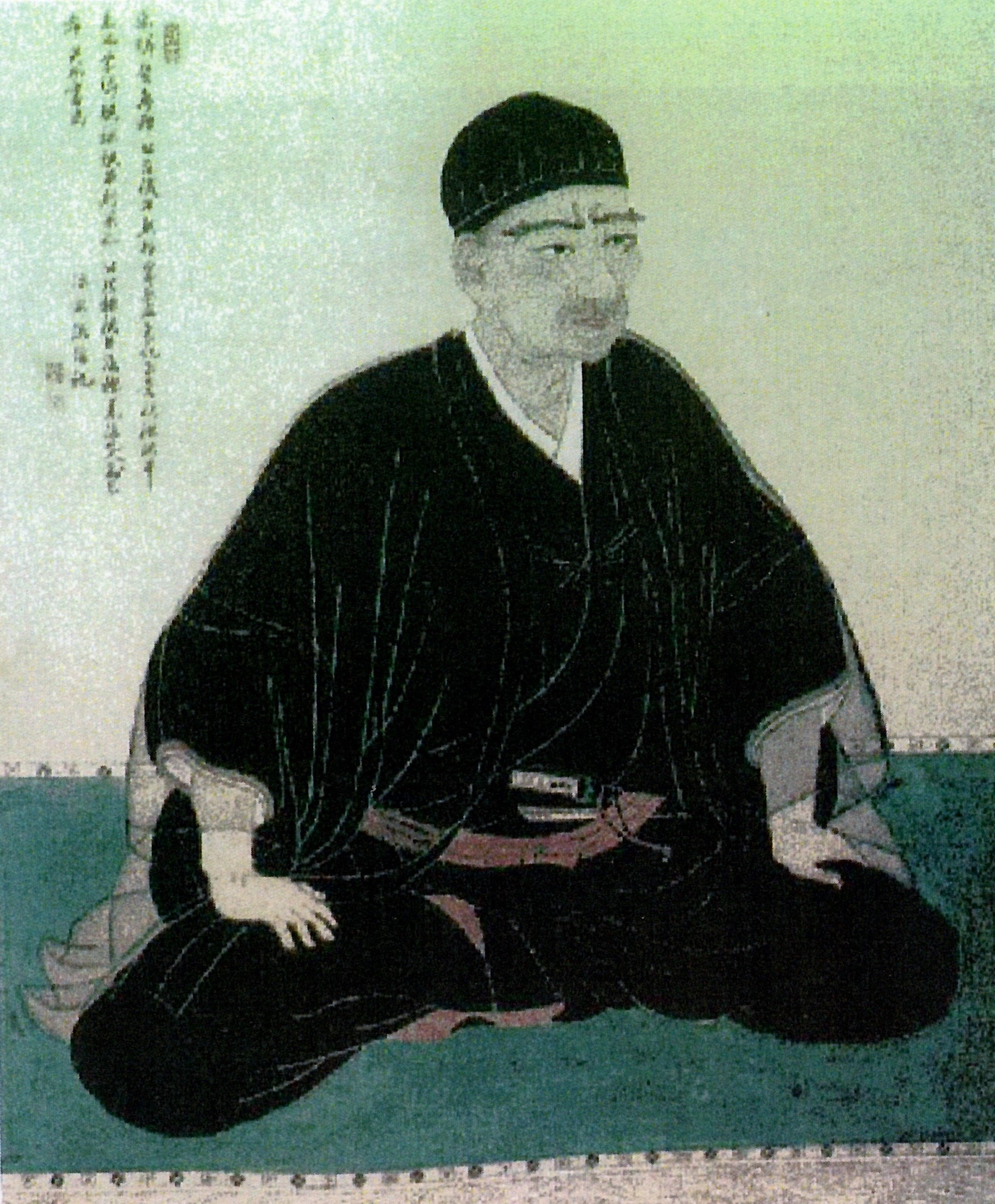 谷衛友の肖像。